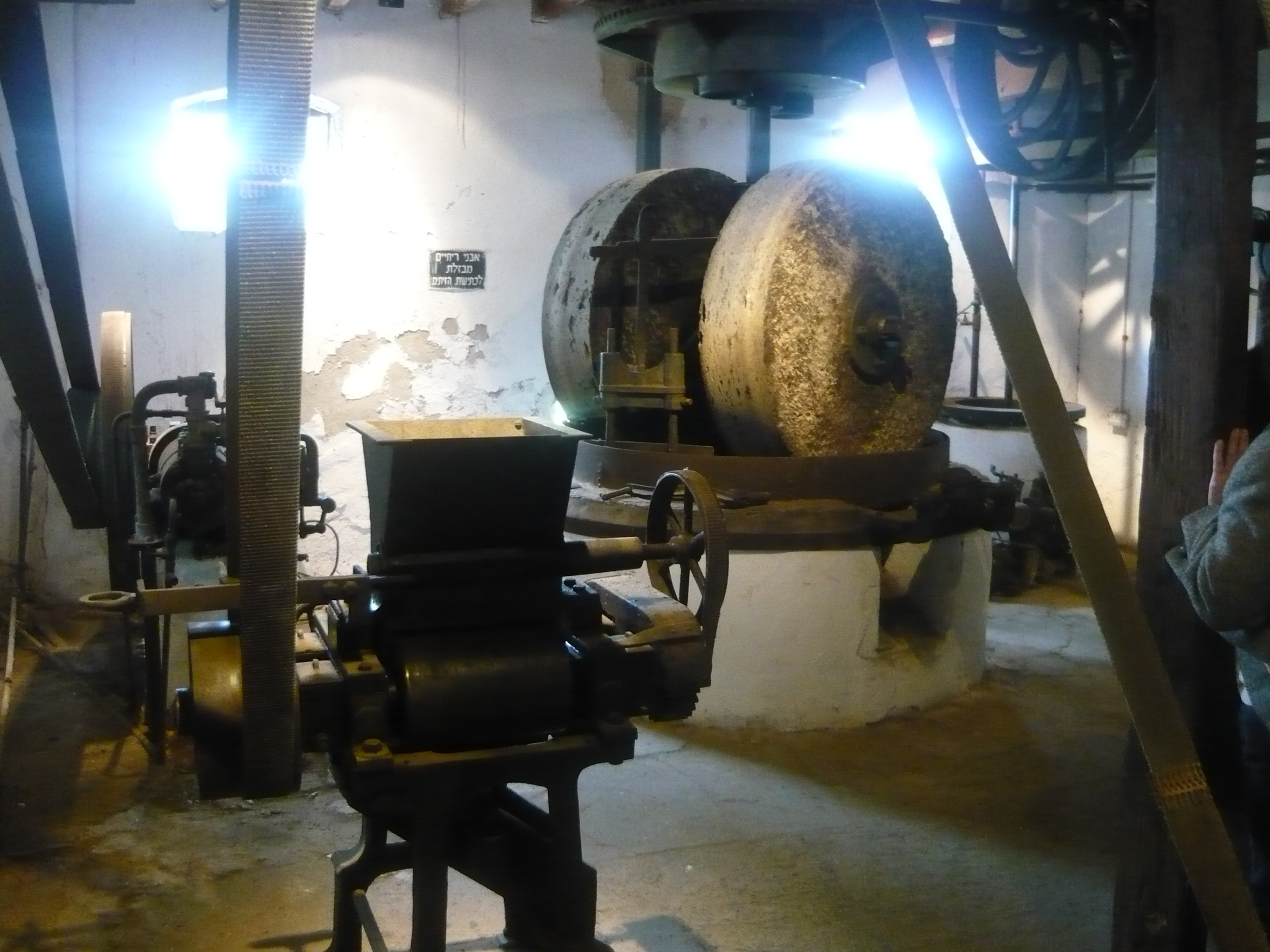 templer olive oil extraction mill in Tel Aviv בית הבד הטמפלרי במושבת הטמפלרים בתל אביב